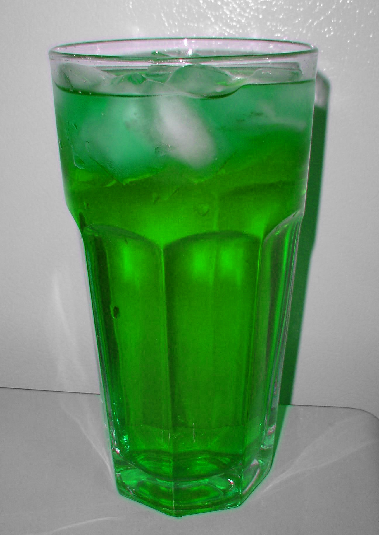 Verre de sirop industriel de menthe à l'eau avec des glaçons / soft drink : water and industrial minth sirup with ice glass This is a retouched picture, which means that it has been digitally altered from its original version. Modifications: Color radically changed.